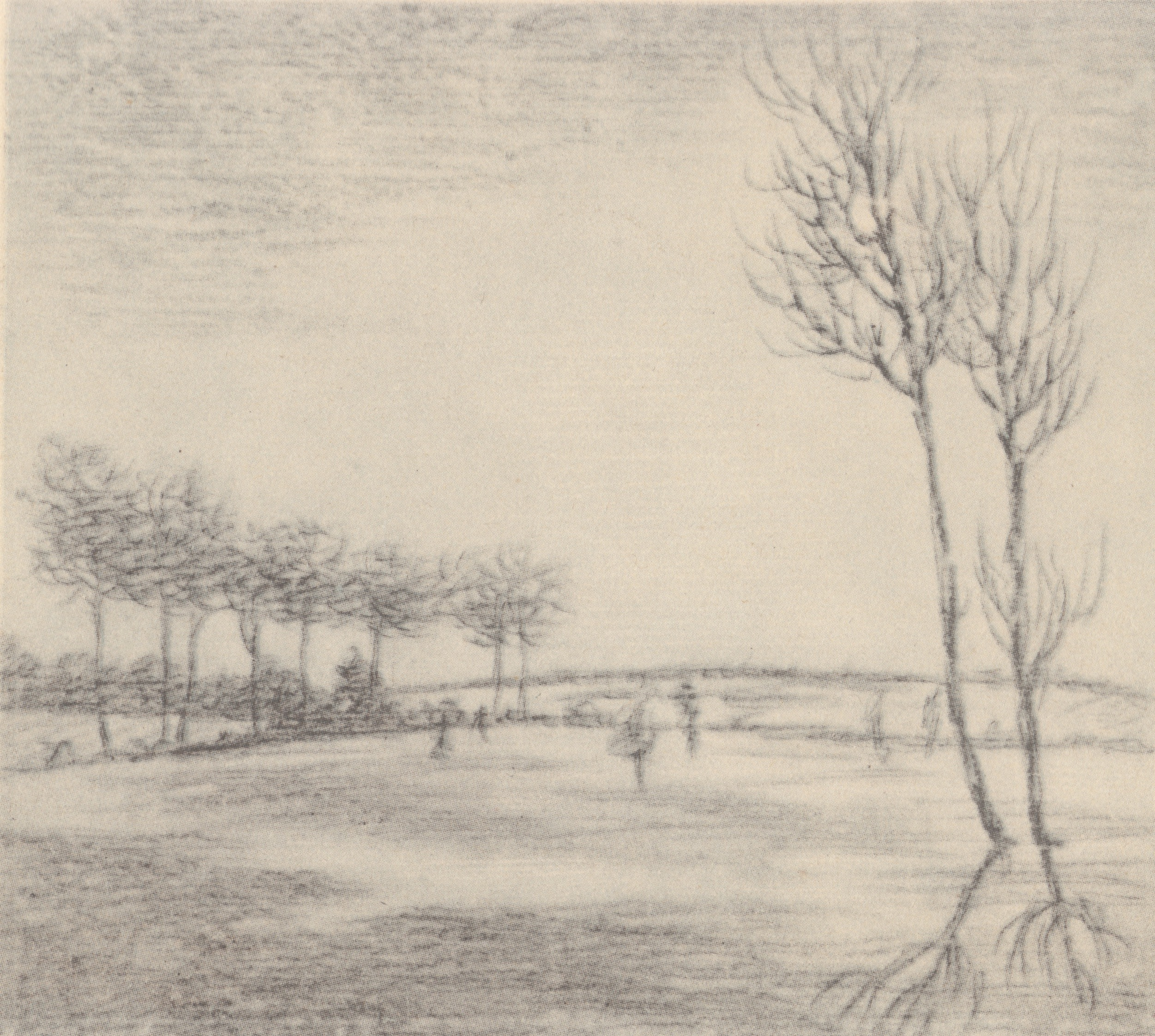 bei Weimar; geschenkt Ulrike von Pogwisch, Weimar vor Italien